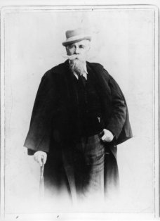 Türr István (1825–1908) fotója